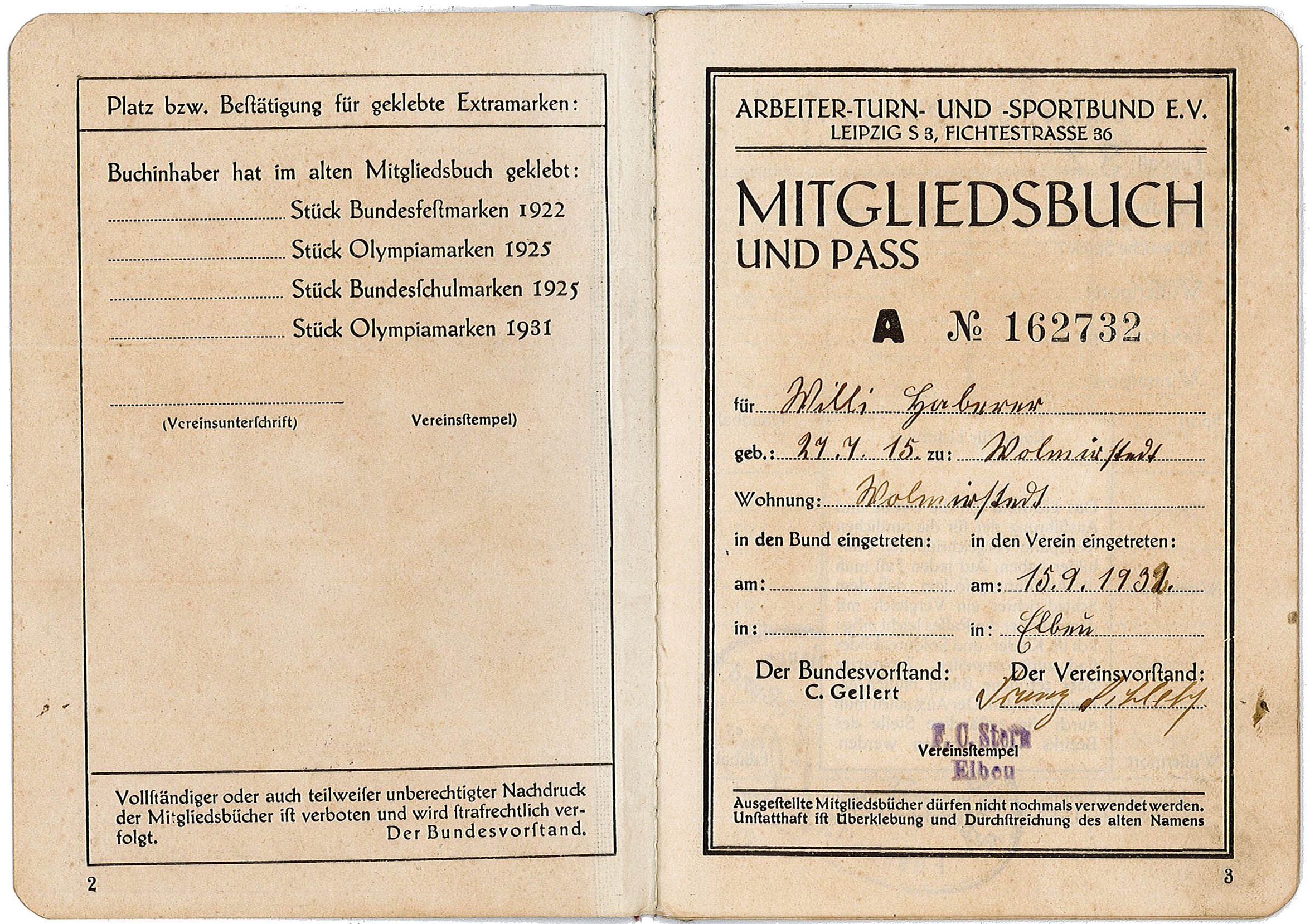 Mitgliedsbuch des Arbeiter-Turn- und Sportbund